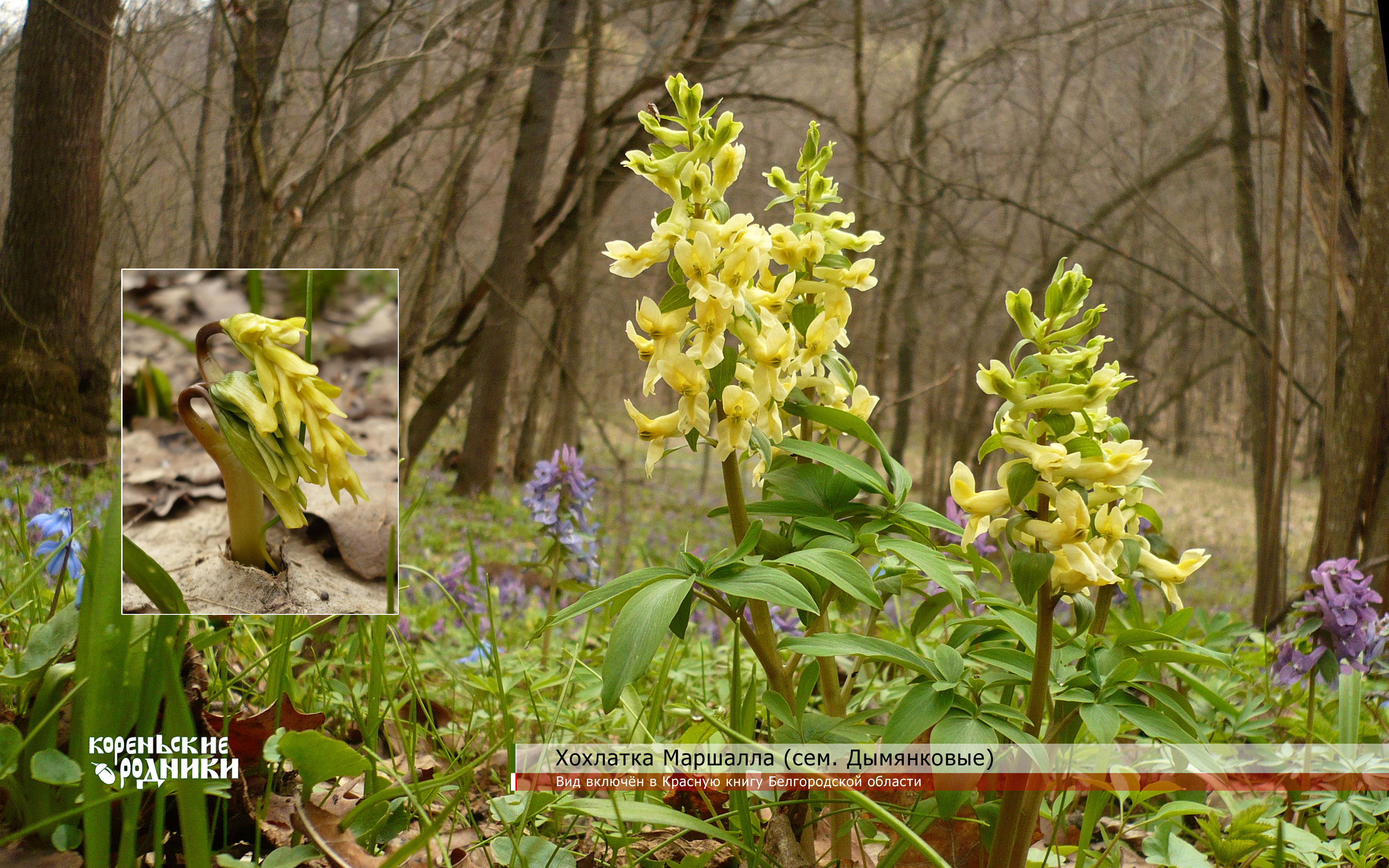 Хохлатка Маршалла. Балка Каменный лог, рядом с родовым экопоселением «Кореньские родники», Белгородская область.